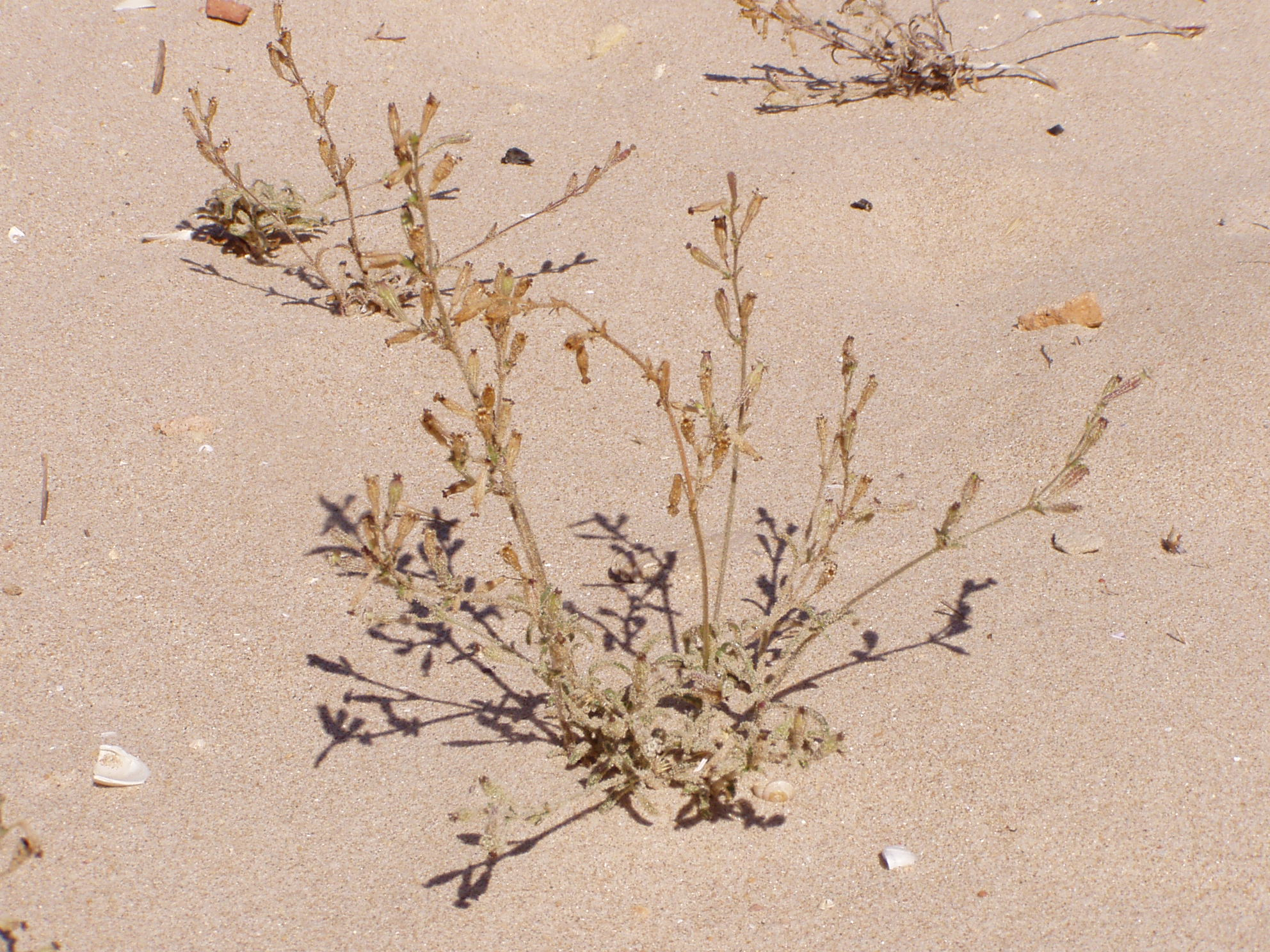 Silene nicaeensis. Lagos, Portugal.